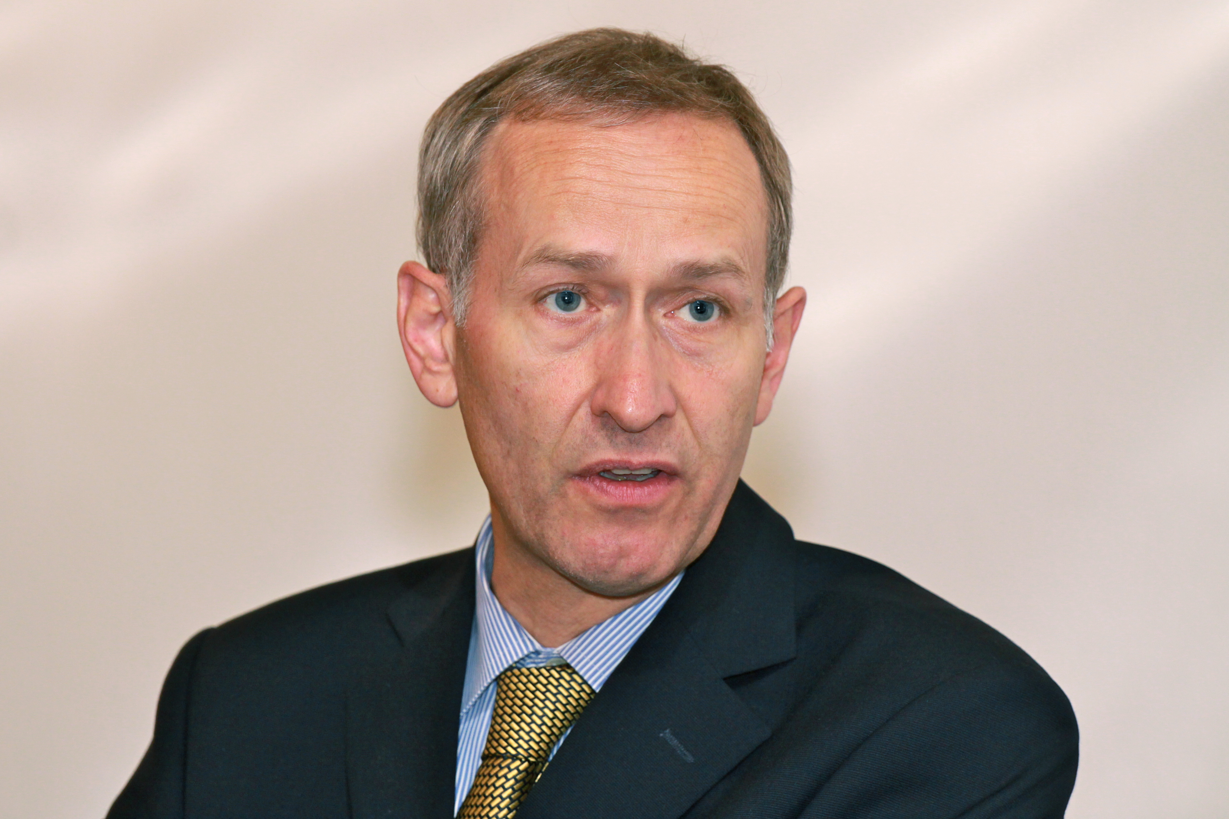 Michael Ambühl, Staatssekretär des Eidgenössischen Departements für auswärtige Angelegenheiten EDA (ranghöchster Schweizer Diplomat).